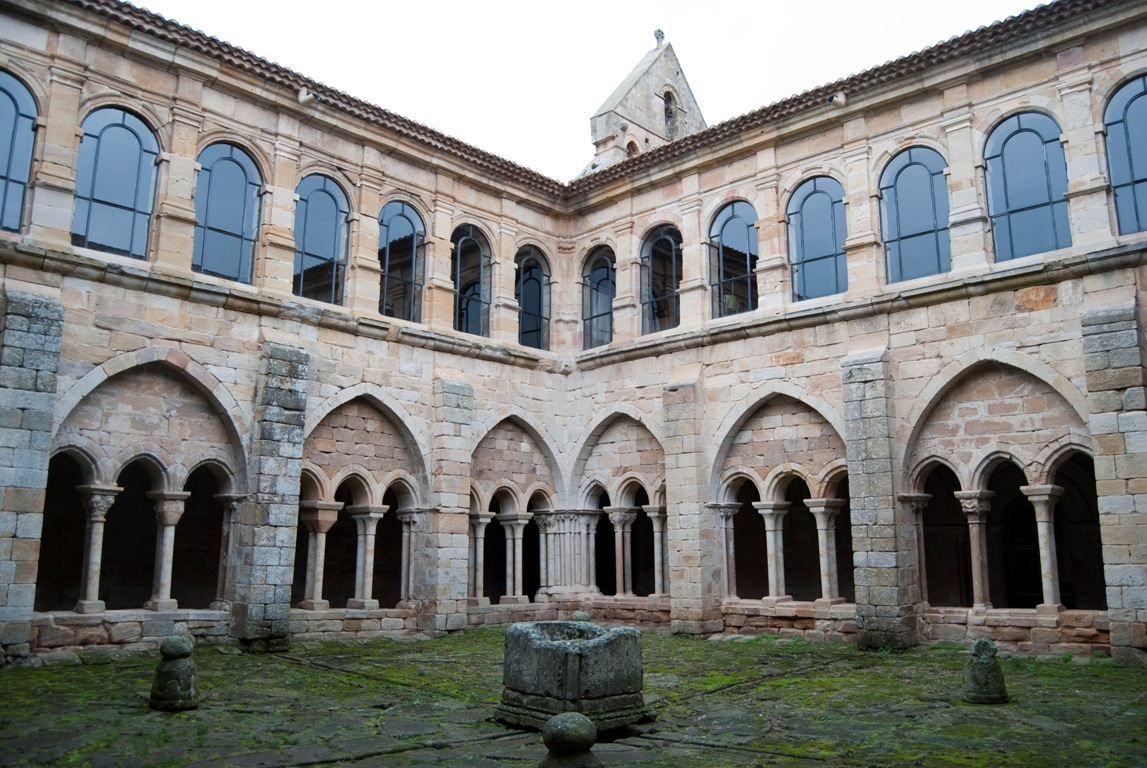 Claustro del Monasterio de Santa María de Aguilar. Aguilar de Campoo. Palencia. España.